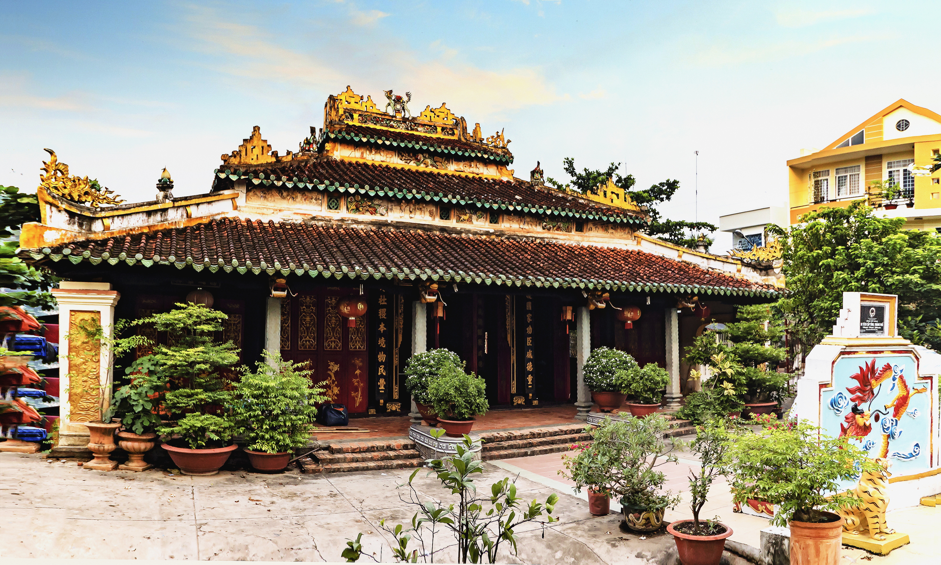 Đình Vĩnh Phước được lập ở nửa đầu thế kỷ 19 (bảng tiểu sử ở đình ghi đình lập năm 1807), hiện tọa lạc tại trên đường Trần Hưng Đạo, thuộc địa bàn phường 1, thành phố Sa Đéc (Đồng Tháp, Việt Nam).